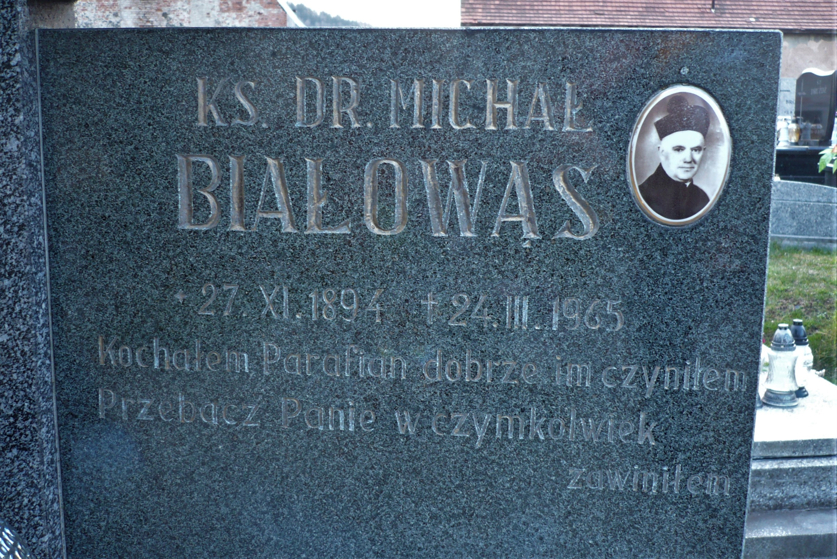 Cmentarz w Nowej Rudzie Białowąs